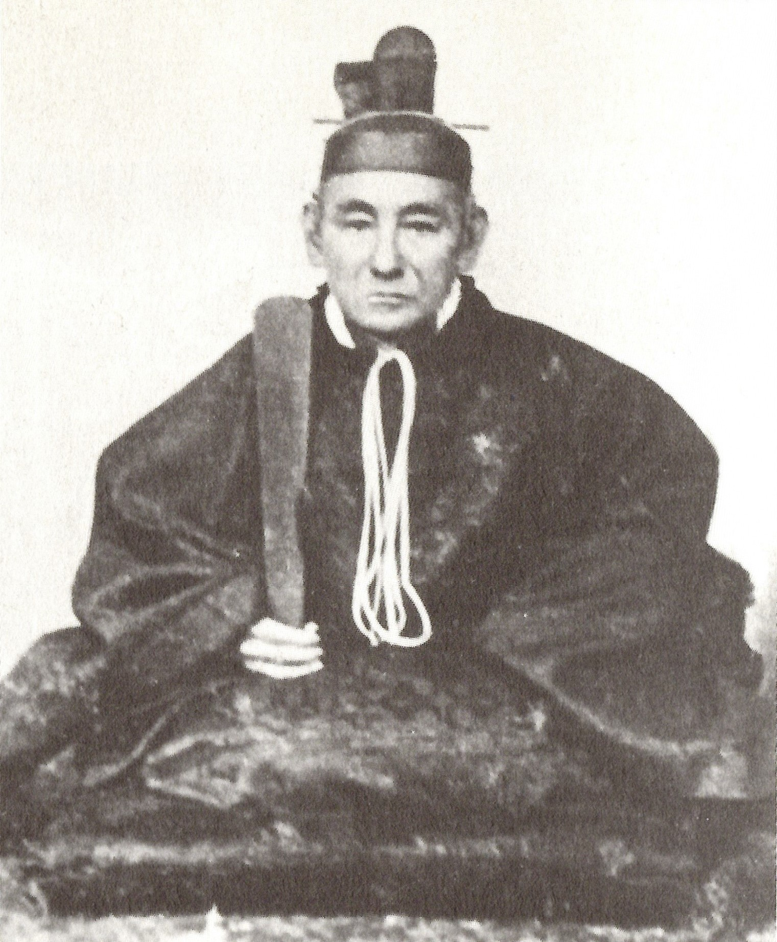 本多康穣の肖像。